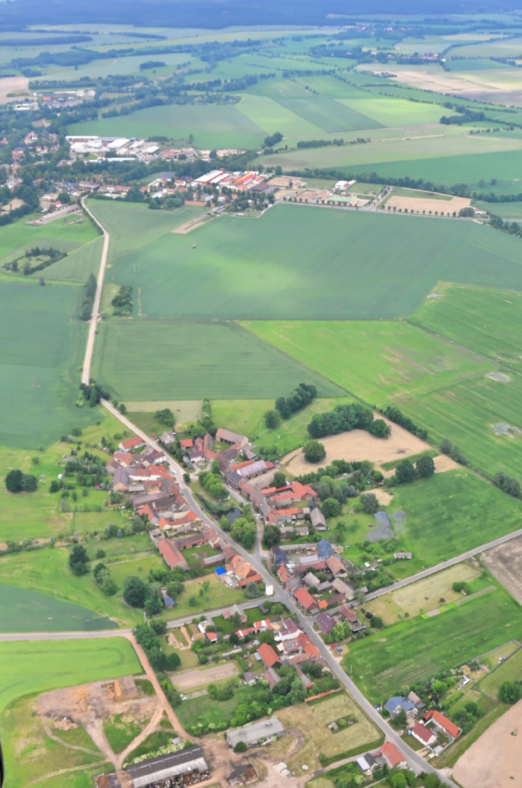 Schwebendorf, im Hintergrund Dahme/Mark.Überführungsflug vom Flugplatz Schwarzheide-Schipkau über Potsdam, Lüneburg zum Flugplatz Nordholz-Spieka